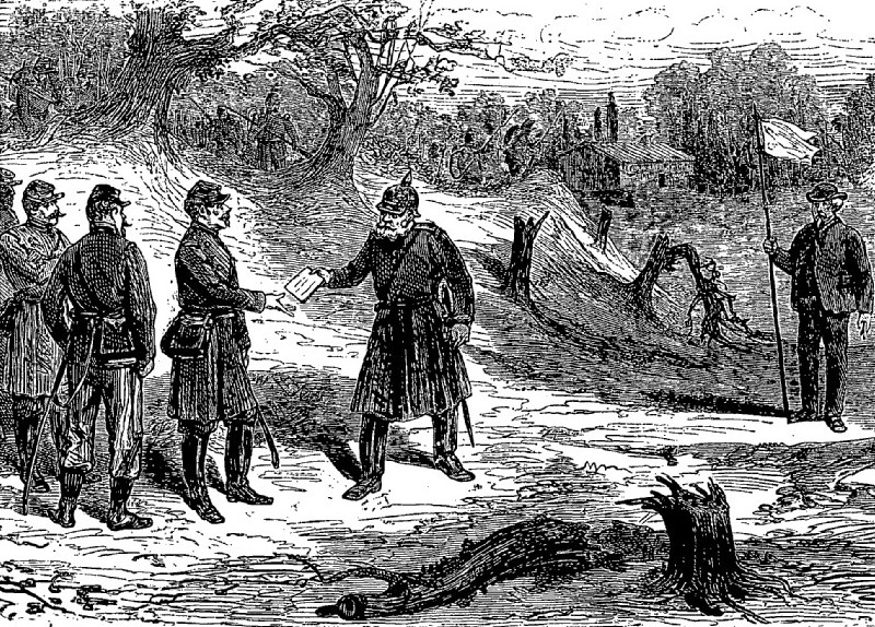 "Régnier arrivant aux avant-postes français" devant Metz (détail d'une gravure de Trichon d'après Miranda publiée dans L'Univers illustré du 1er novembre 1873).